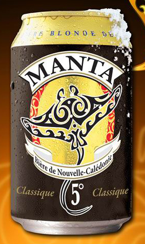 Avec ses 5° d’alcool, Manta Classique est plus douce que sa grande sœur Manta Intense, mais toujours 100% locale. Désaltérante, cette bière calédonienne se caractérise par son goût légèrement fruité et sa fine pétillance.